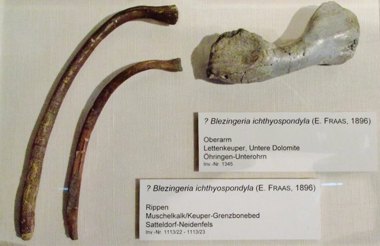 Fossil of Blezingeria, an extinct reptile - Muschelkalkmuseum Hagdorn